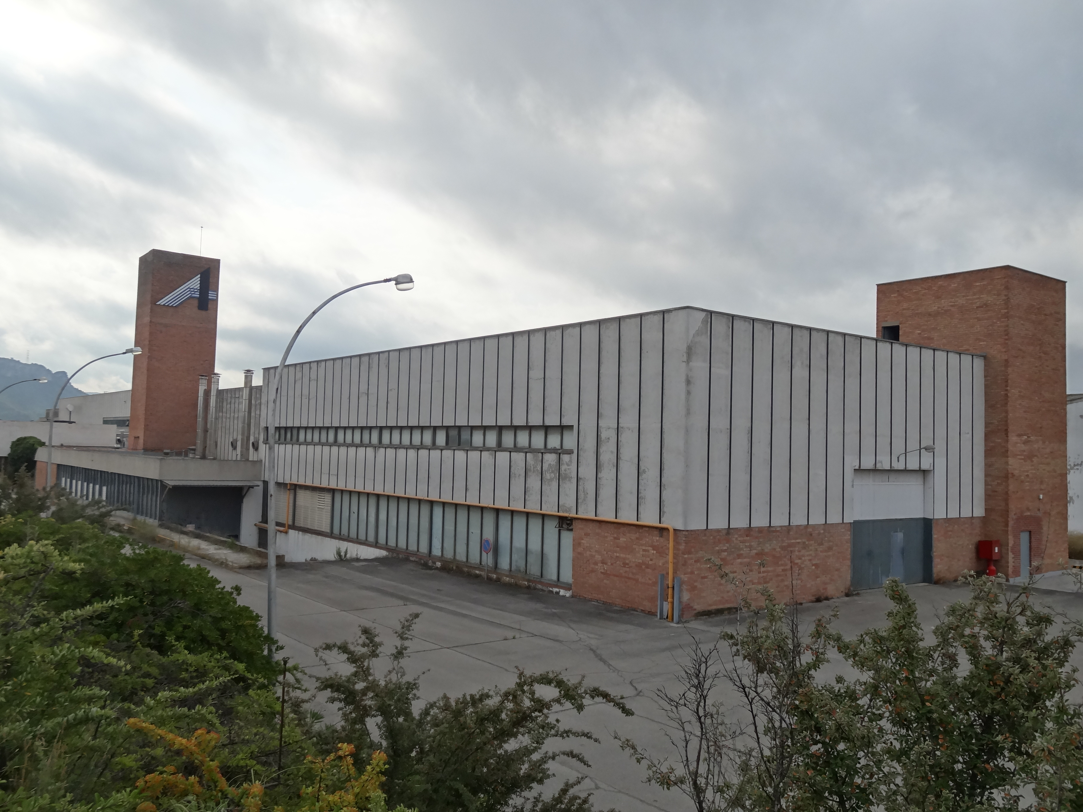 Fàbrica Polifibra (Òdena)